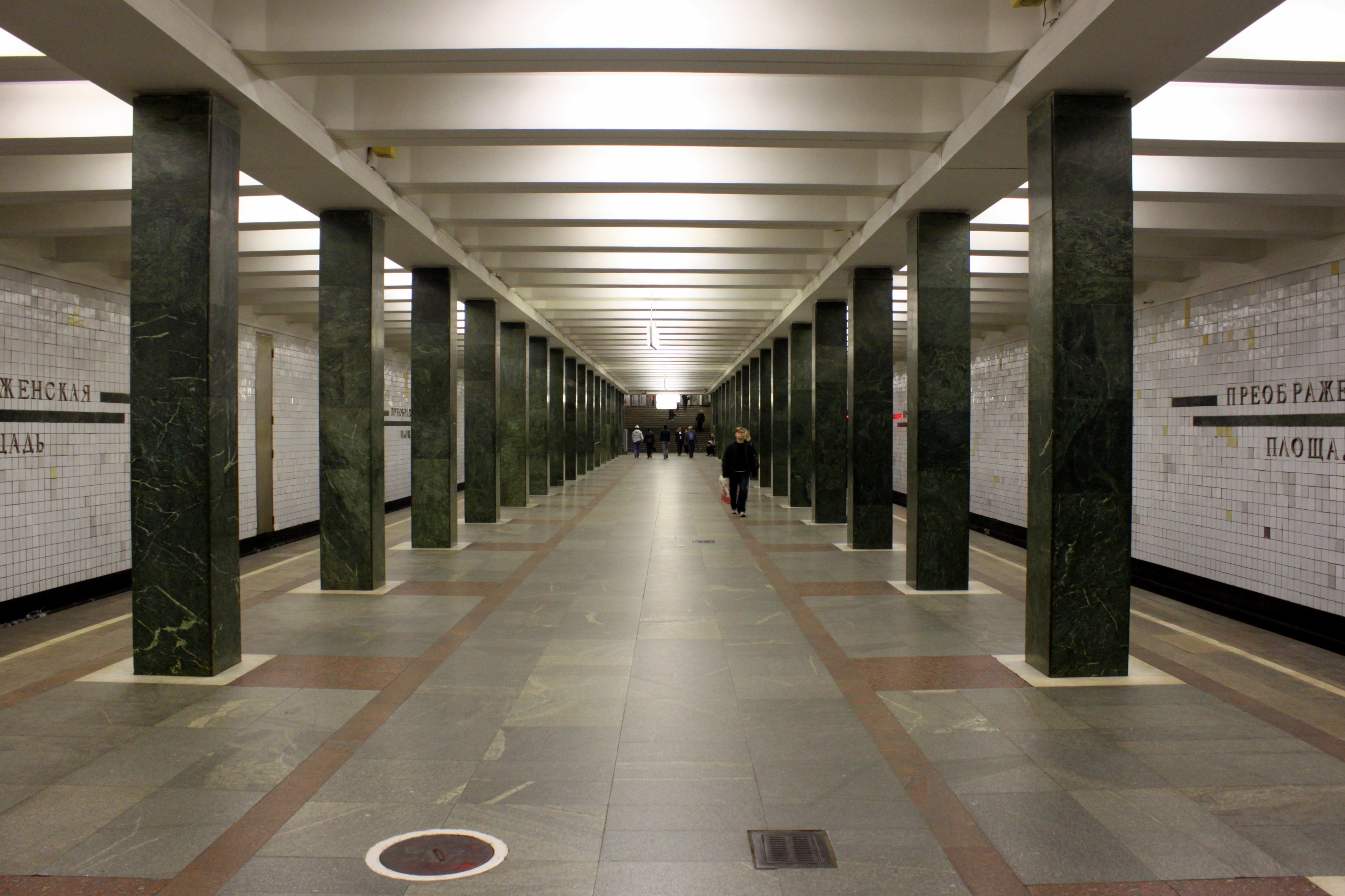 Станция московского метрополитена "Преображенская площадь"